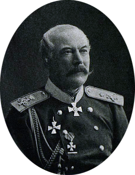 Генерал-адъютант Тотлебен Эдуард Иванович